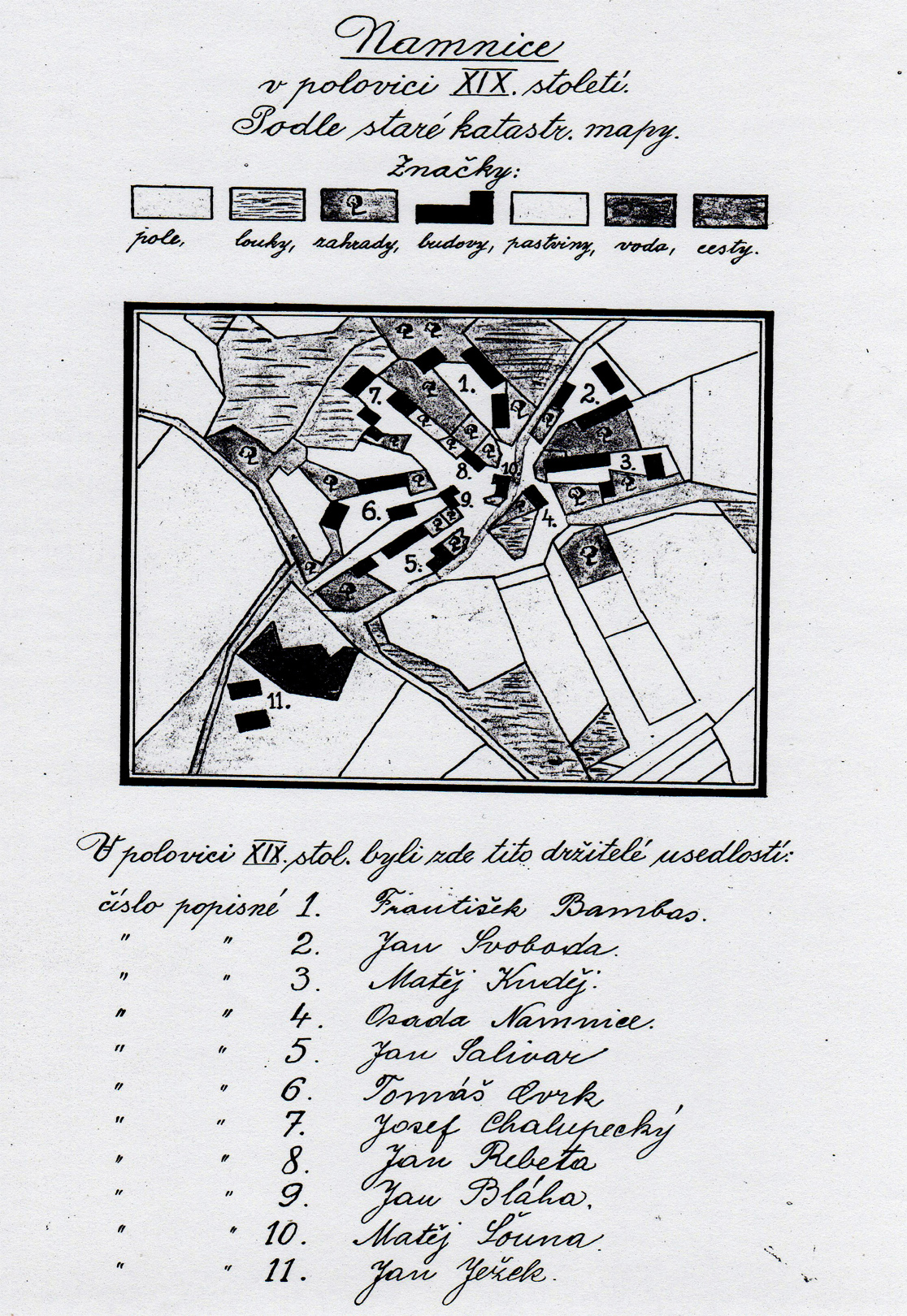 Mapa Namnic v polovině 19. století